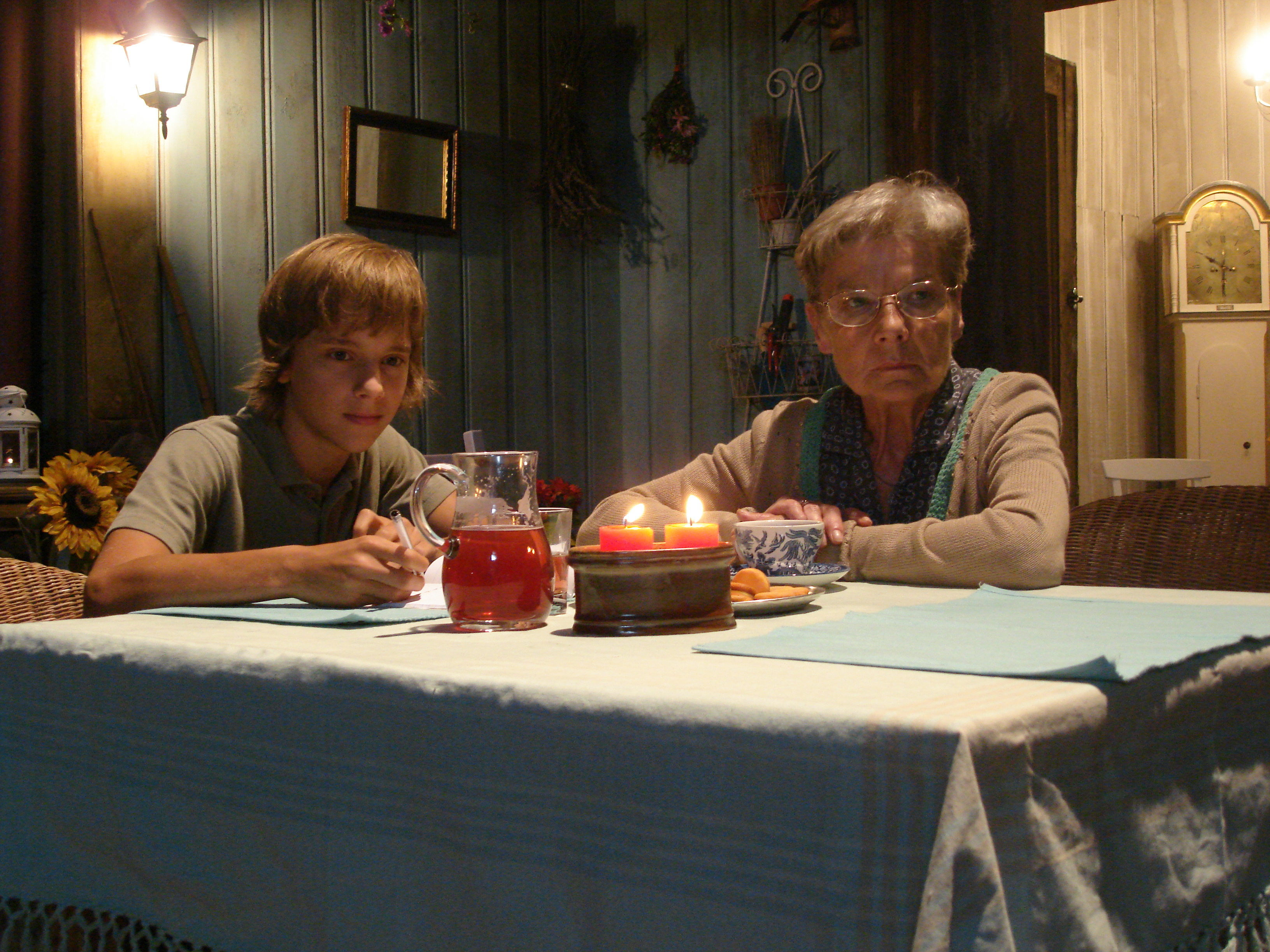 Aleksandra Górska jako Babcia Lucyna i Maciek Musiał jako Michał